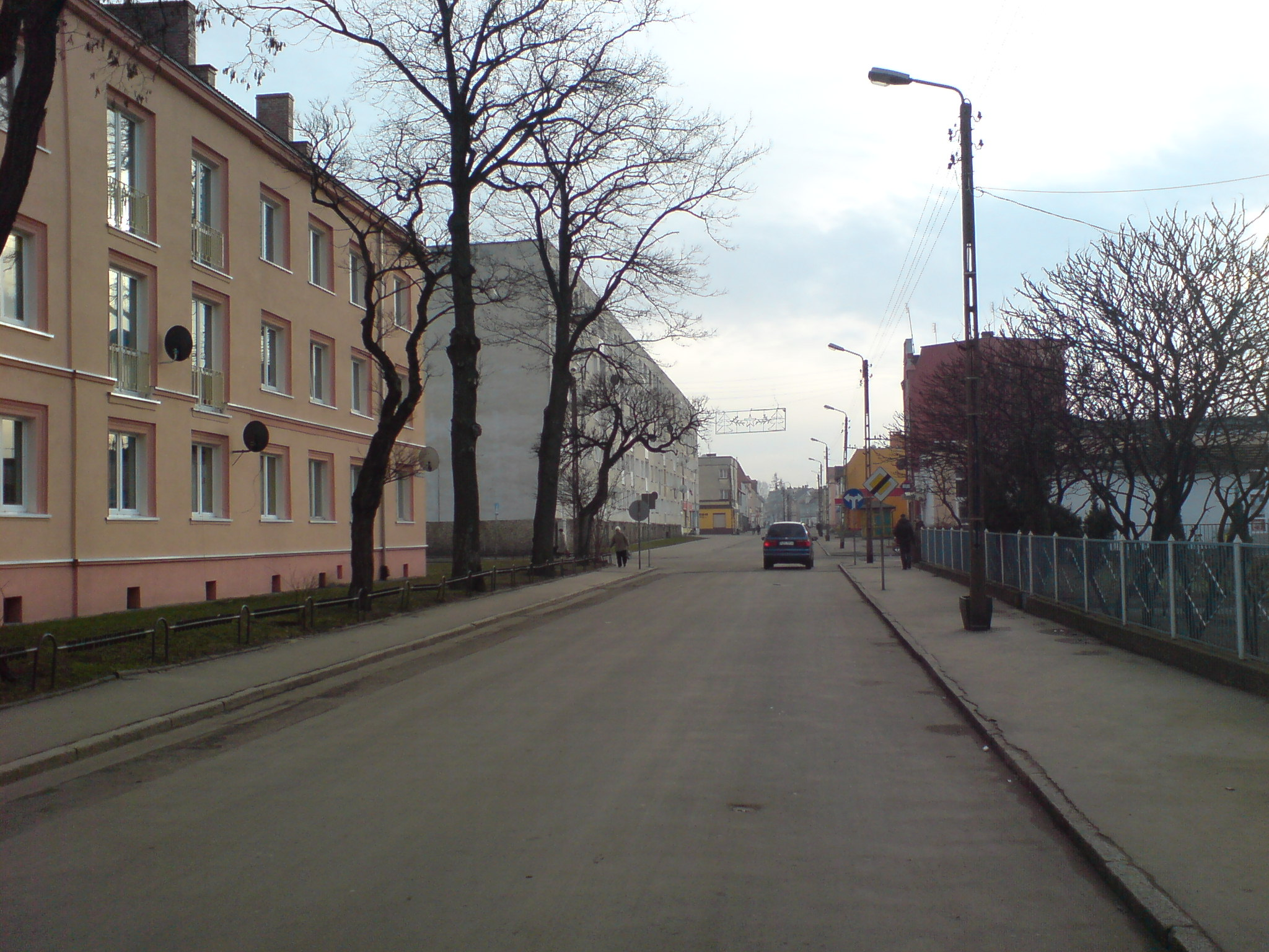 ulica w Pieńsku